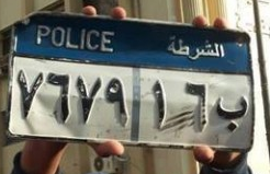 Granatowy kolor tablic radiowozów.